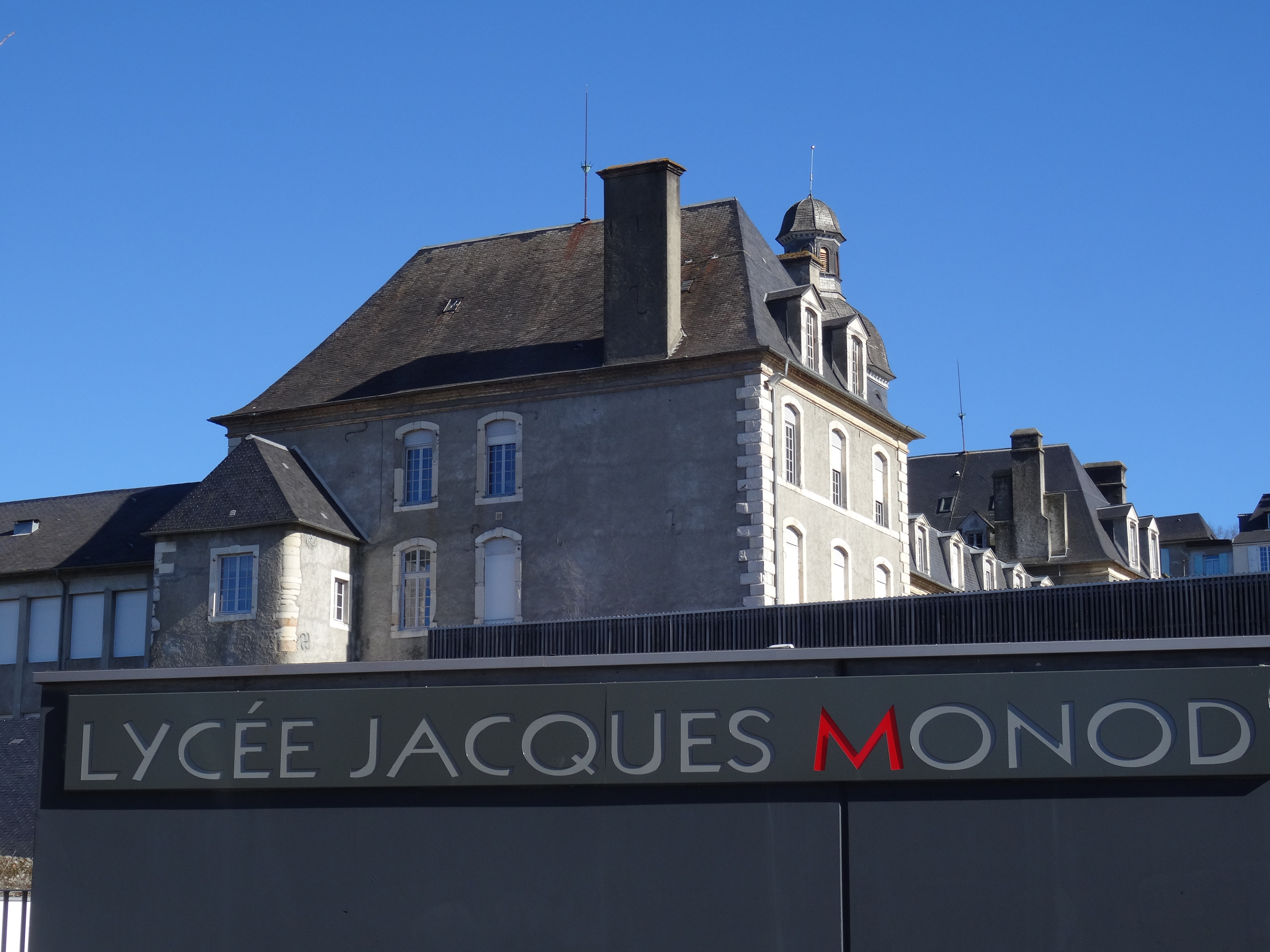 Lycée Jacques Monod de Lescar